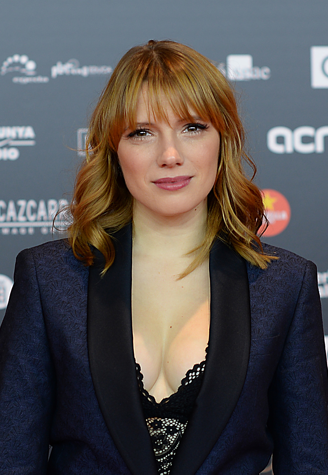 Diana Gómez, actriu, XII Premis Gaudí (2020)